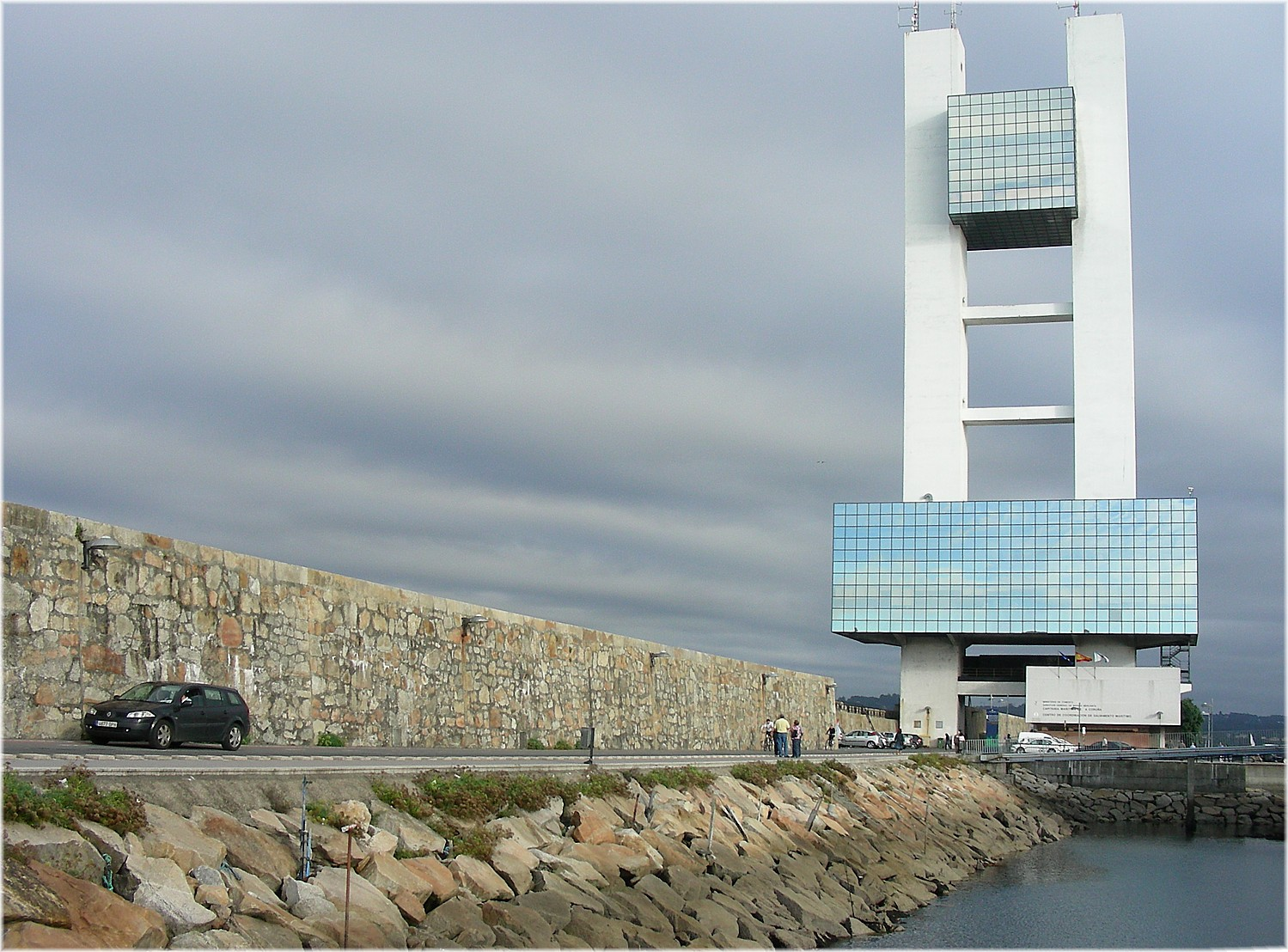 Torre de control, porto da Coruña Torre de control maritimo en el dique de abrigo del puerto de A Coruña, dominando la entrada de la ria